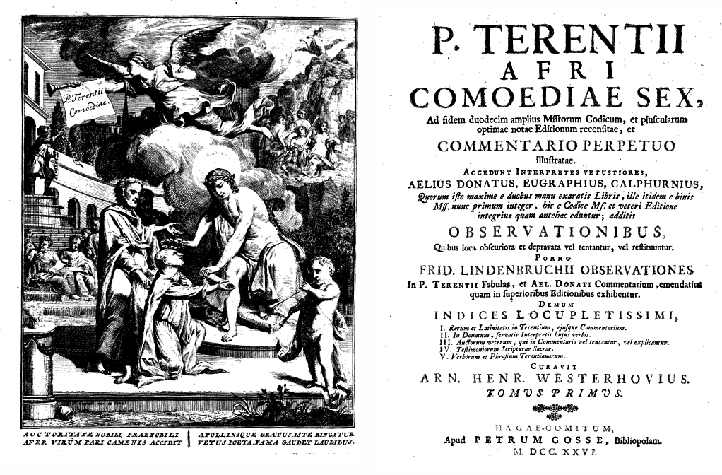 Titelblad van "Comoediae sex" van Terentius bewerkt door Arnoldus Henricus Westerhovius (circa 1677 - 1738)